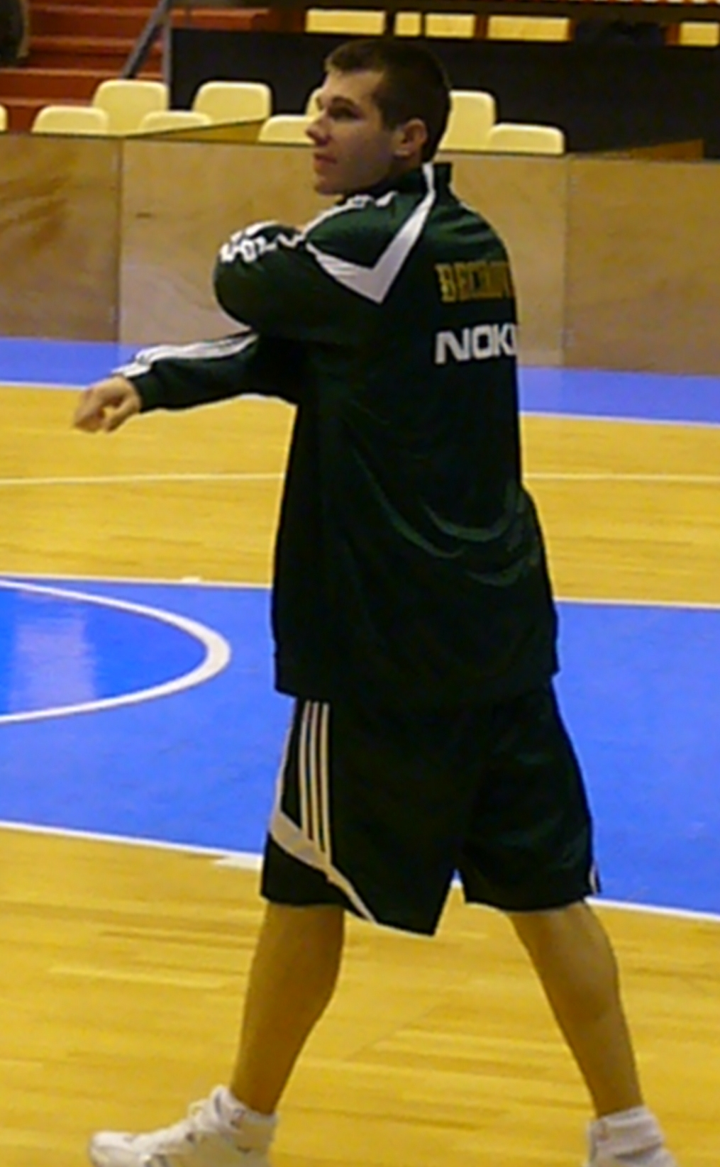 Le joueur slovène de basket-ball Sani Bečirovič en novembre 2007 pour l'Euroleague (Clermont-Ferrand)